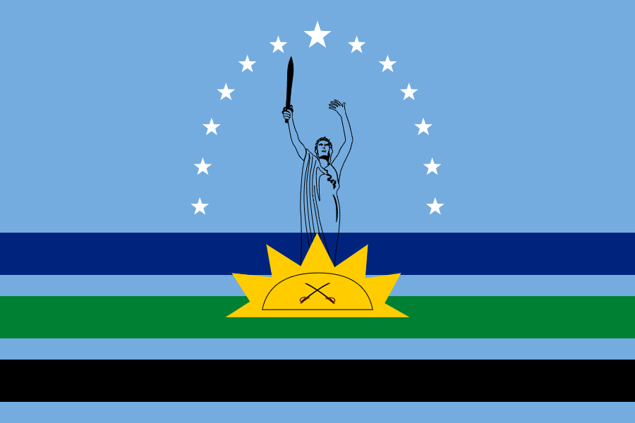 Vlag van Monagas